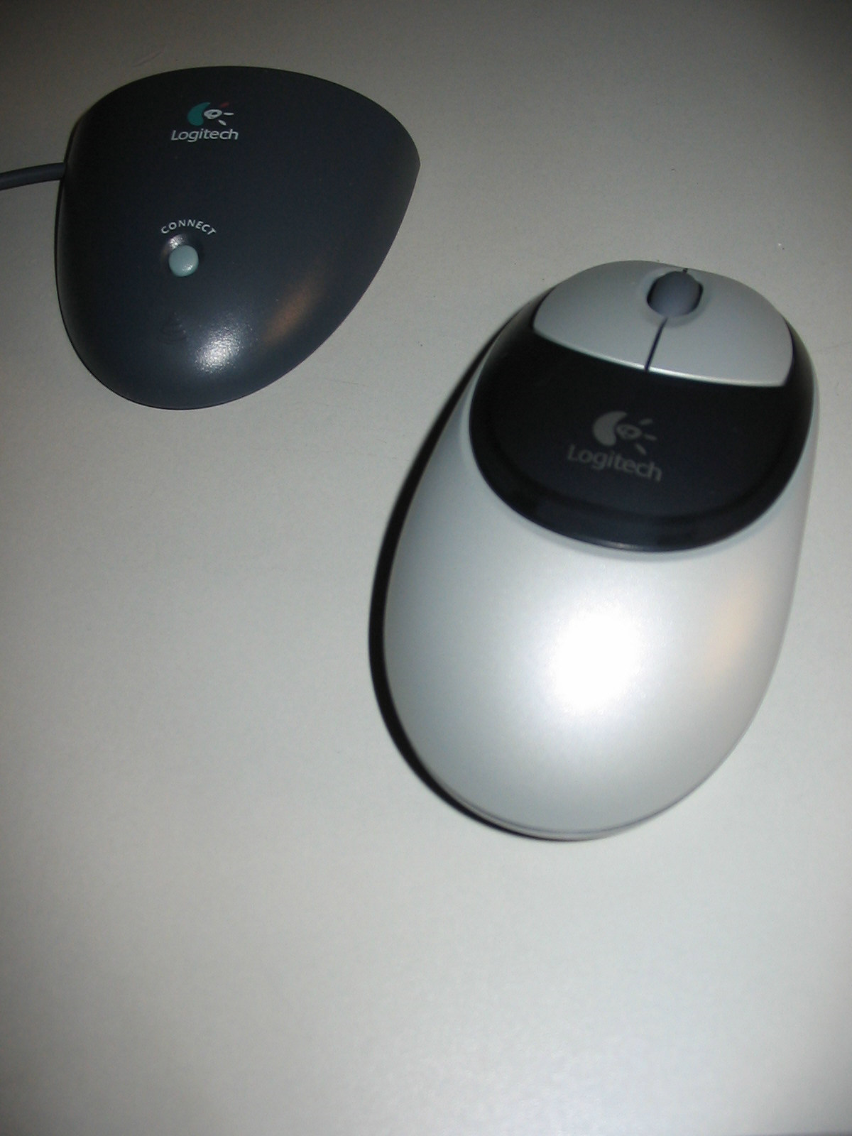 Souris sans fil de marque Logitech. Je suis l'auteur du cliché